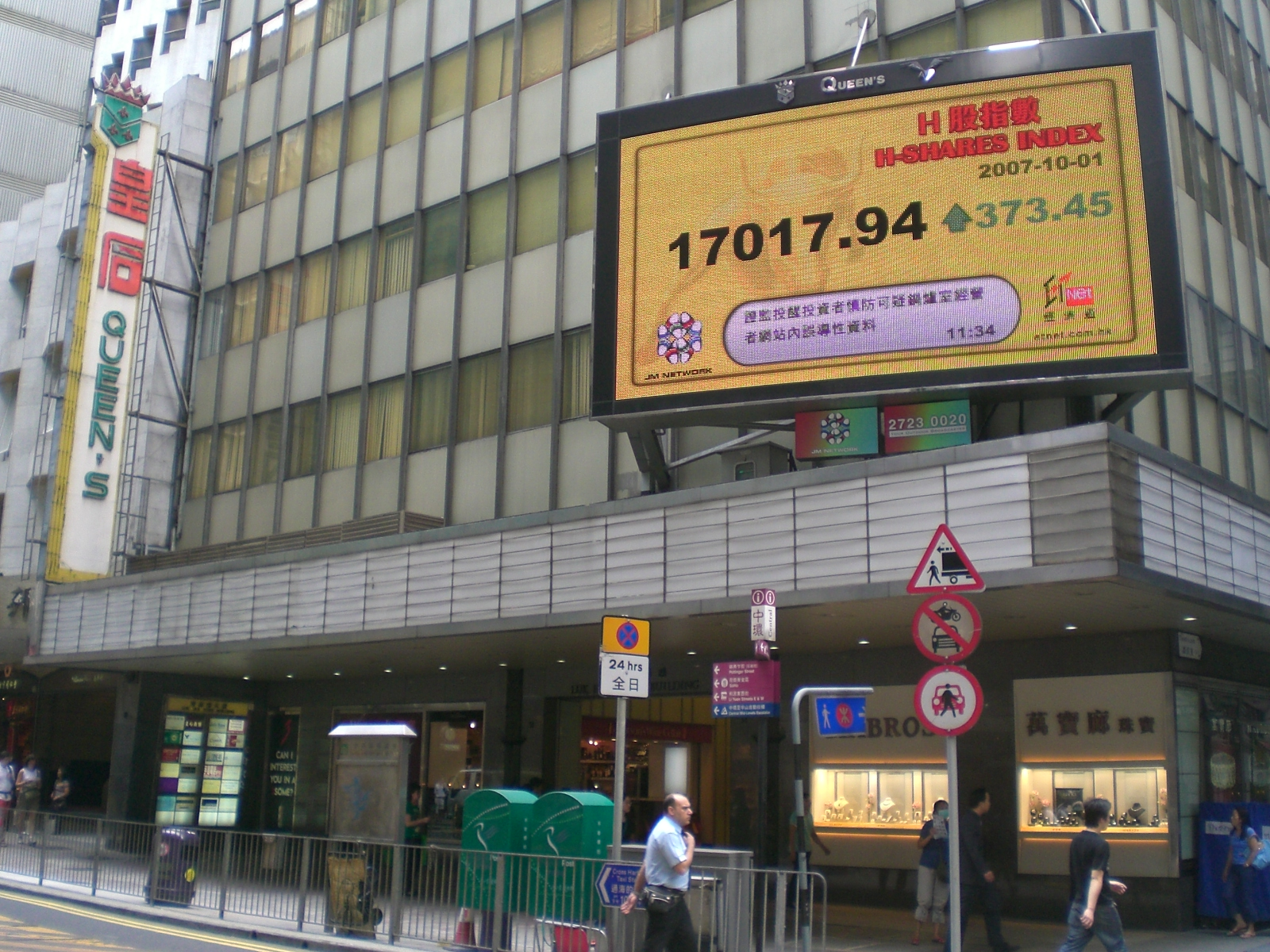 Author= DDMLL 皇后戲院, 恆生指數, 陸海通大廈, Luk Hoi Tong Building, 皇后大道中